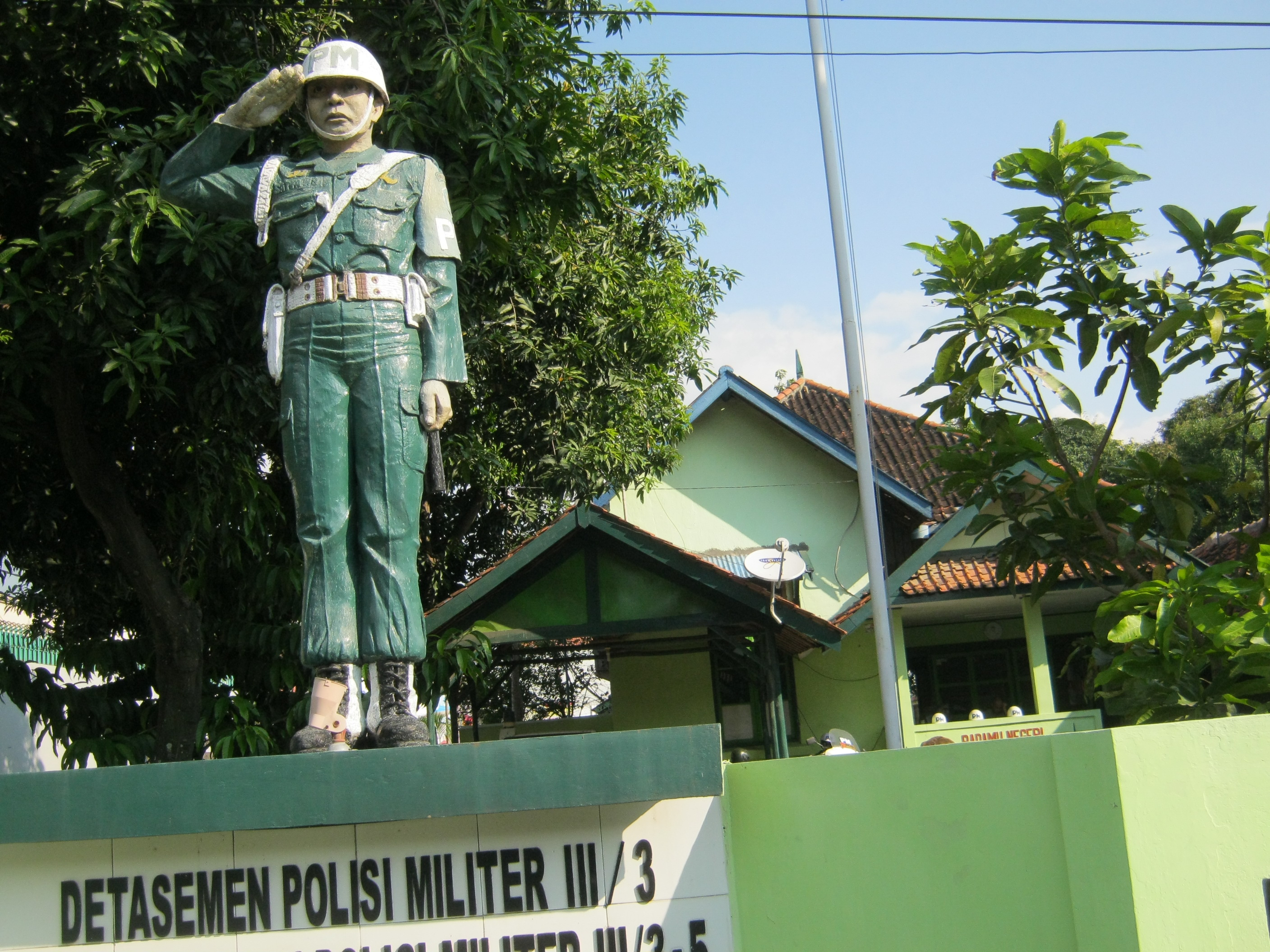 Pos Polisi Militer, Kadipaten, Majalengka